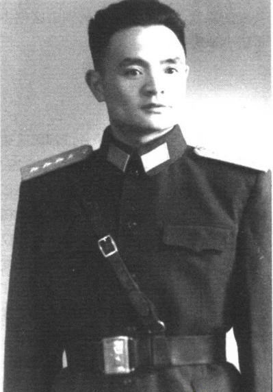 中文（中国大陆）: 1955年被授予大校军衔的万海峰